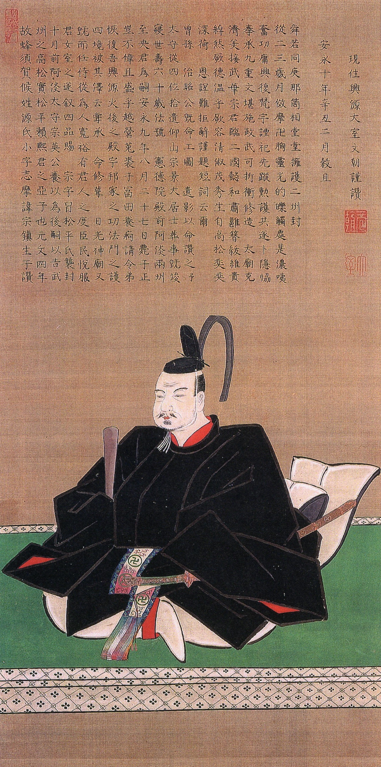 蜂須賀宗鎮の肖像。